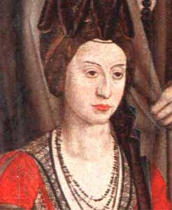 Isabel of Coimbra. Rainha de Portugal